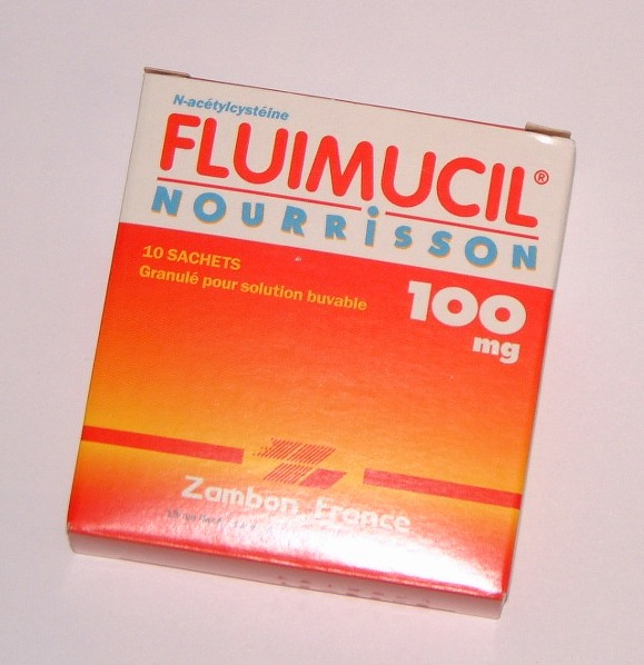 N-acétylcystéine